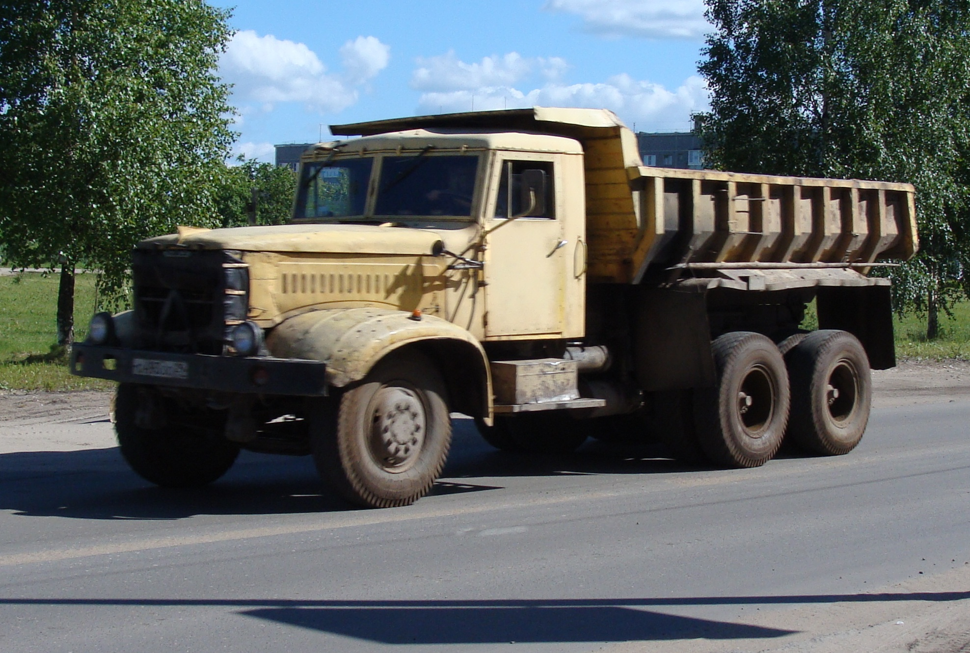 Грузовик КрАЗ-256Б, Котлас